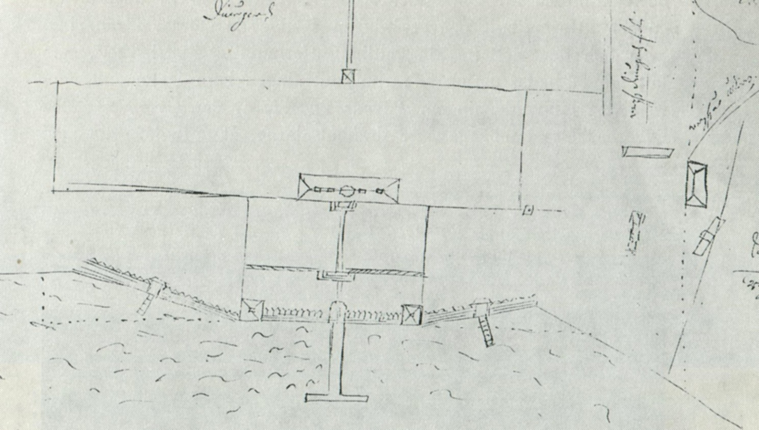 Drottningholms slotts föregångare, skiss